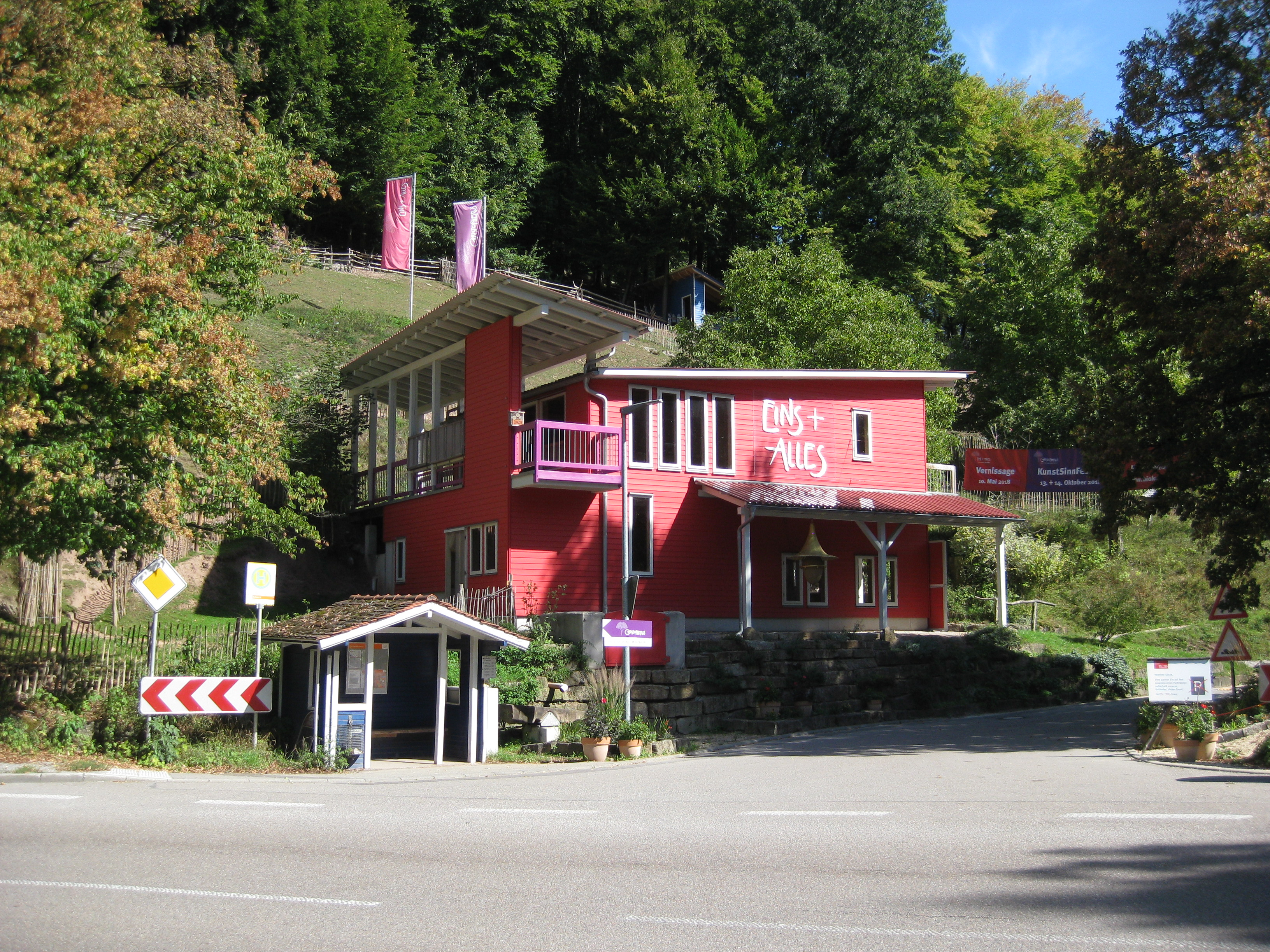 Erfahrungsfeld der Sinne Eins+Alles, ein Freizeit- und Erlebnispark im Welzheimer Wald